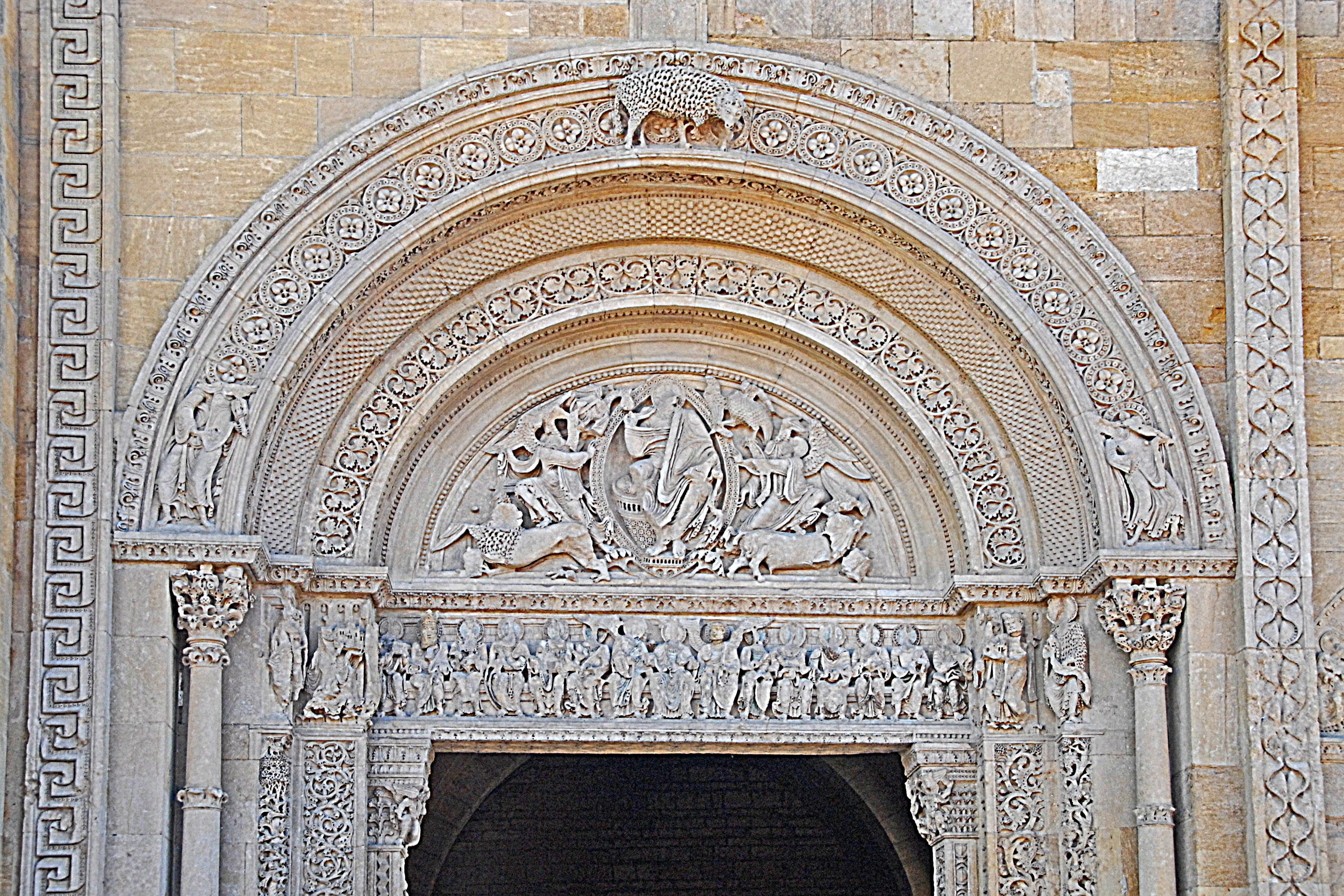 Großes Nordportal, Archivoltenbögen